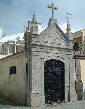 Capela do Senhor dos Aflitos